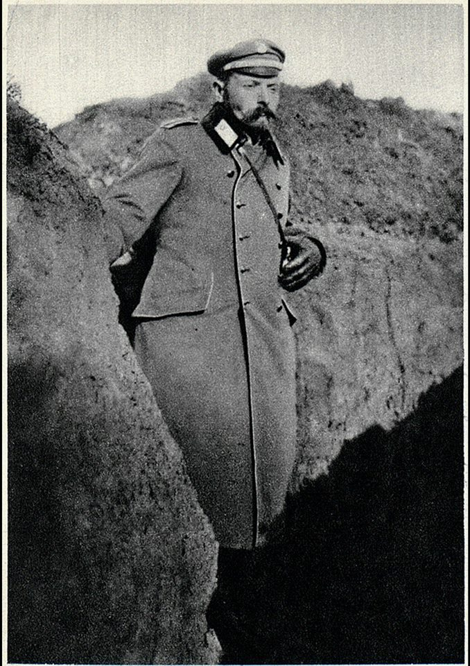 Major Włodzimierz Mężyński podczas I Wojny Światowej, w okopach, na froncie.